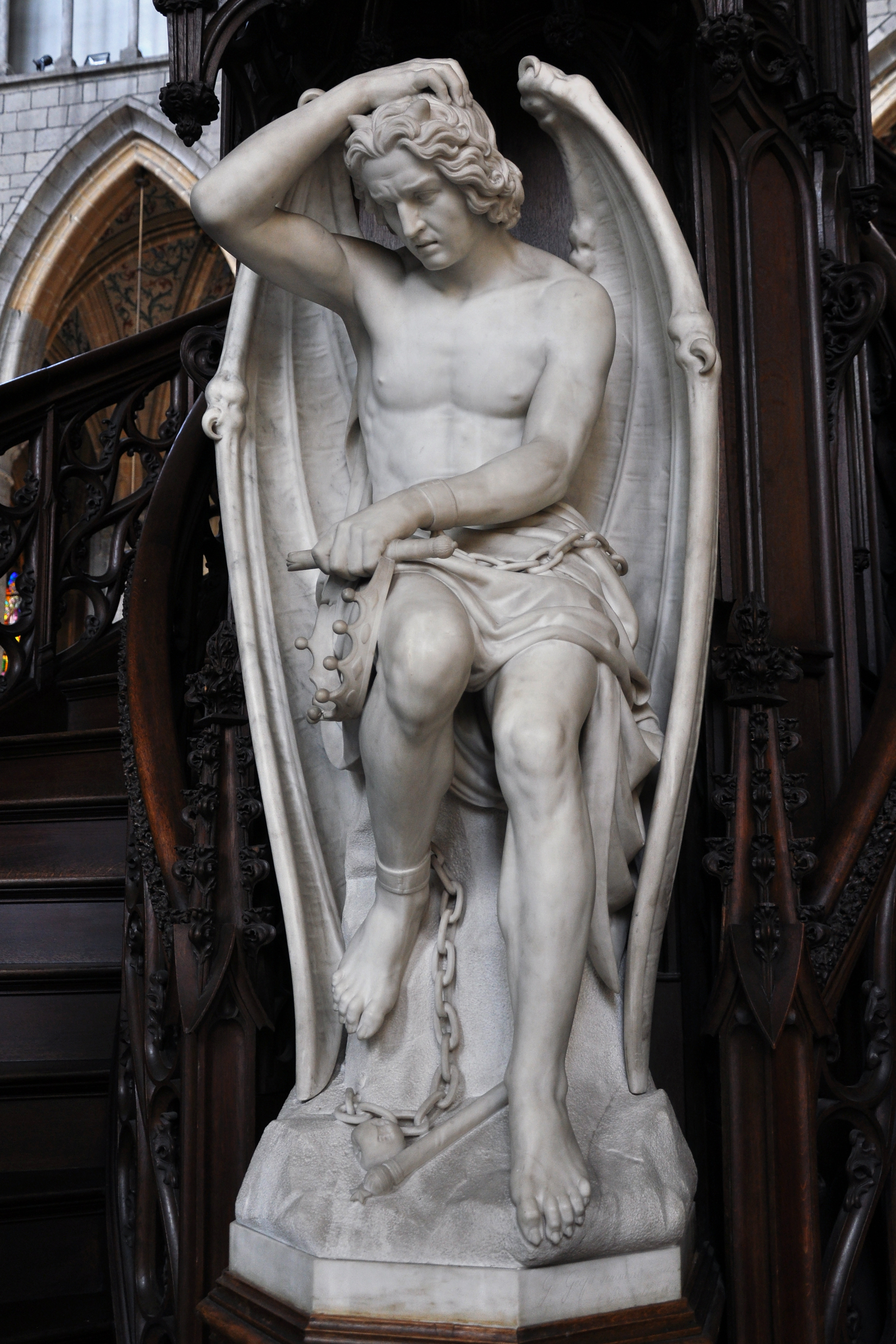 Cathédrale Saint-Paul de Liège; la chaire, par Guillaume Geefs, de style néo-gothique, datant du milieu du 19ème siècle. Détail: Lucifer, au revers de la chaire.